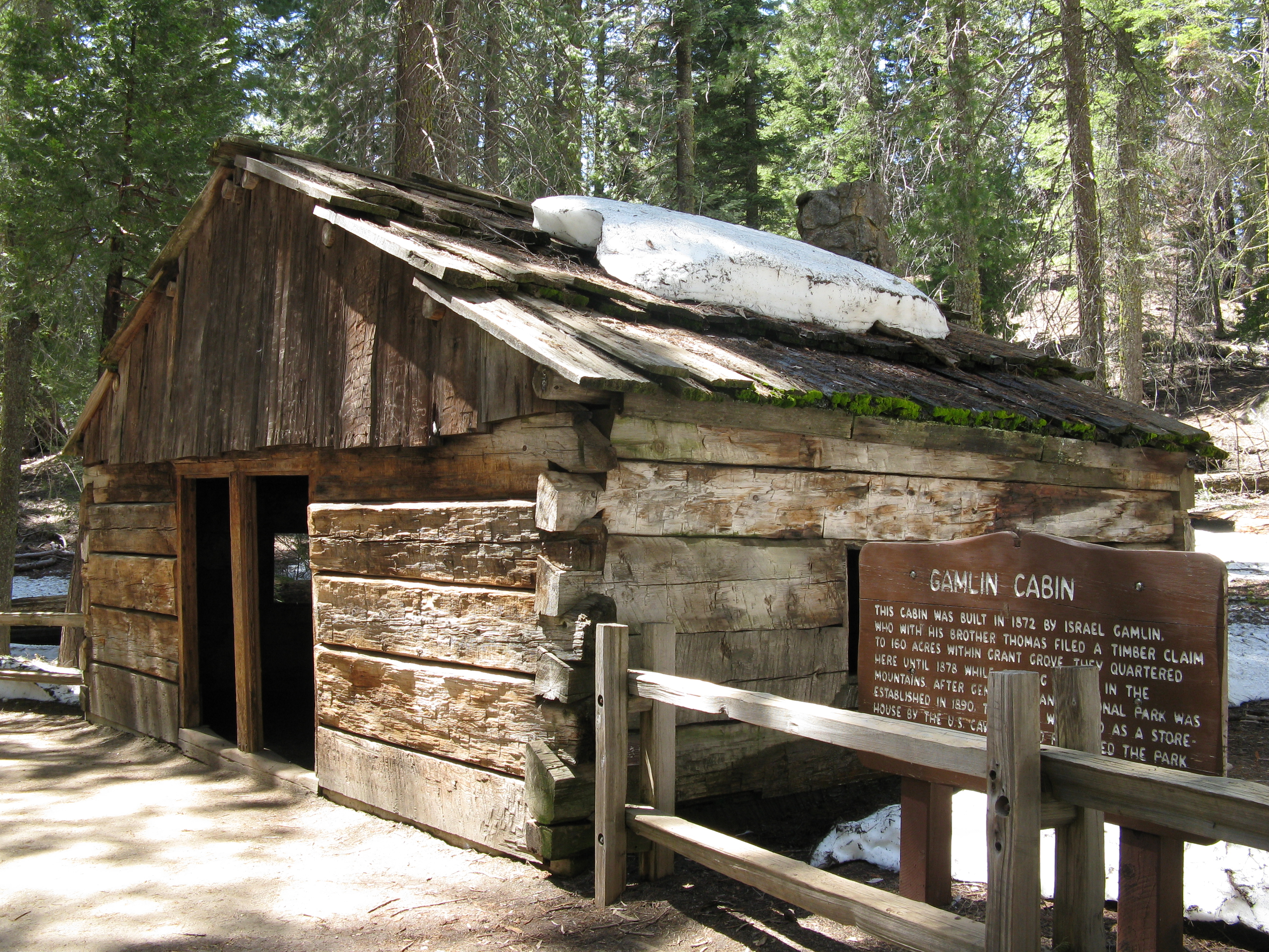 Gamlin Cabin